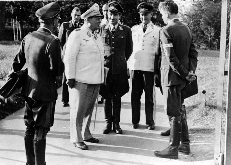 [Scherl-Text] Im Hauptquartier des Reichsmarschalls, Der Reichsmarschall im Gespräch mit Generalmajor Galland, Generaloberst Loerzer und Reichsminister Speer. Achtung! PK-Aufnahme! PK-Kriegsberichter Eitel Lange 25.8.43 [Herausgabedatum] J 15 189 4191-43